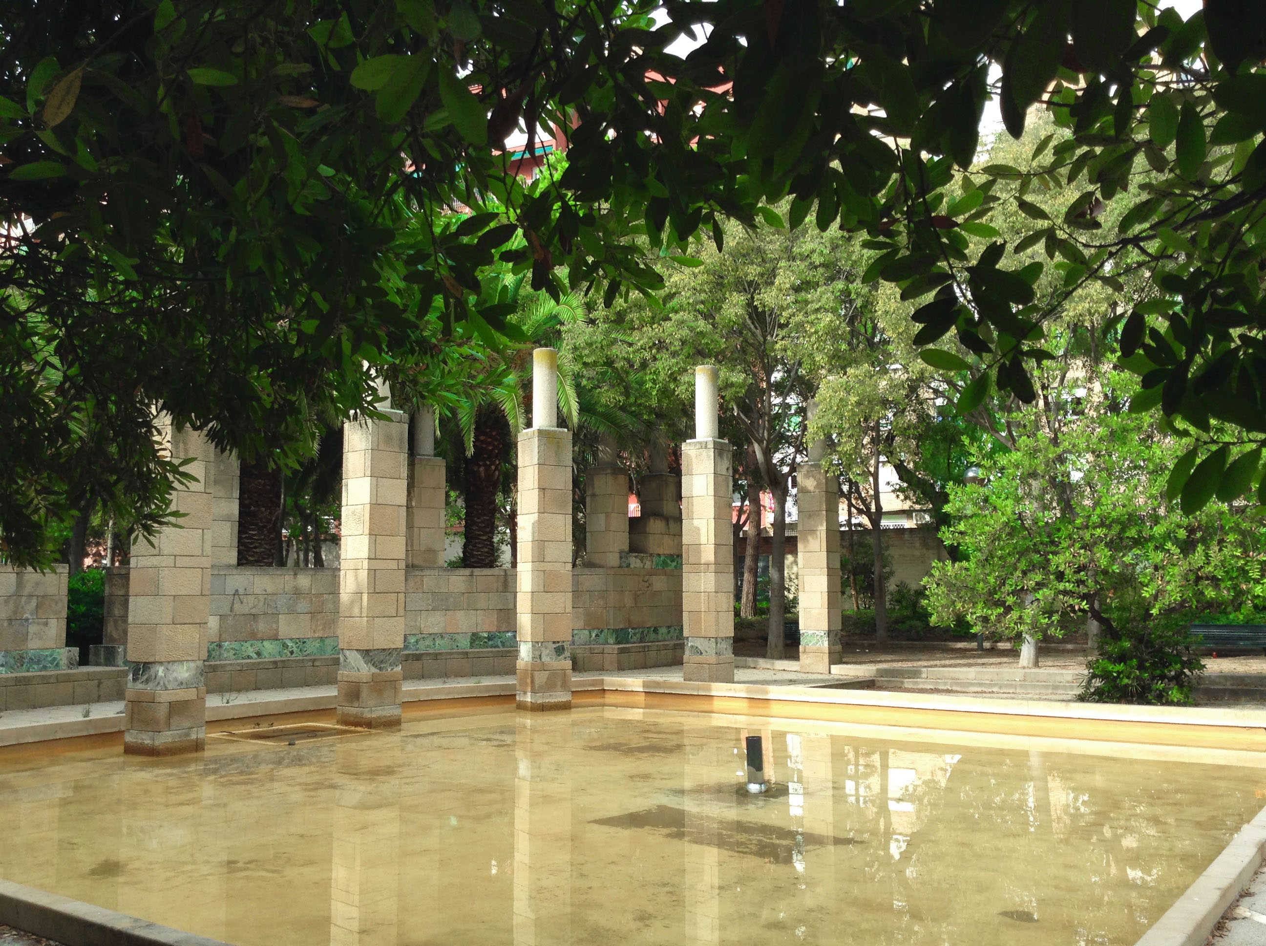 Columnata